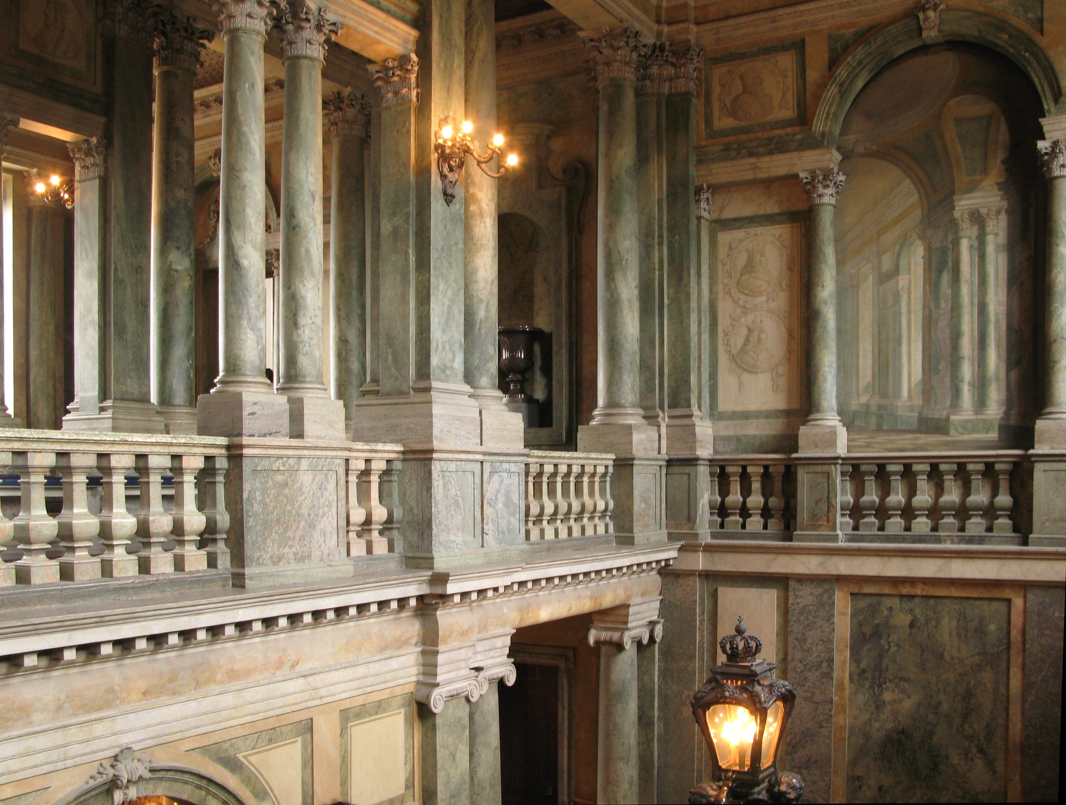 Stockholms slott: Västra trapphallen (trapphuset, kungens trappa)